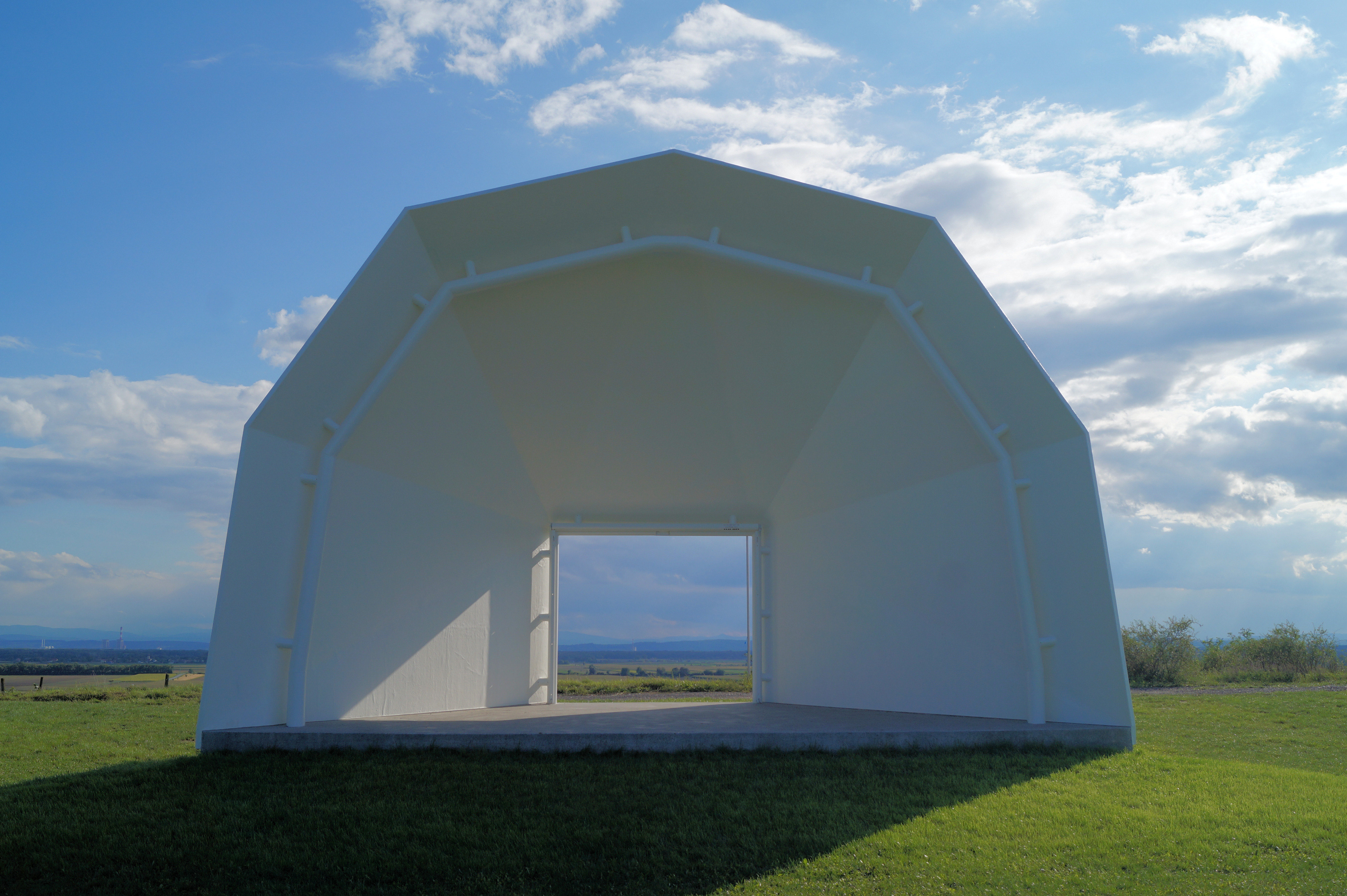 Wagramfenster - August 2014